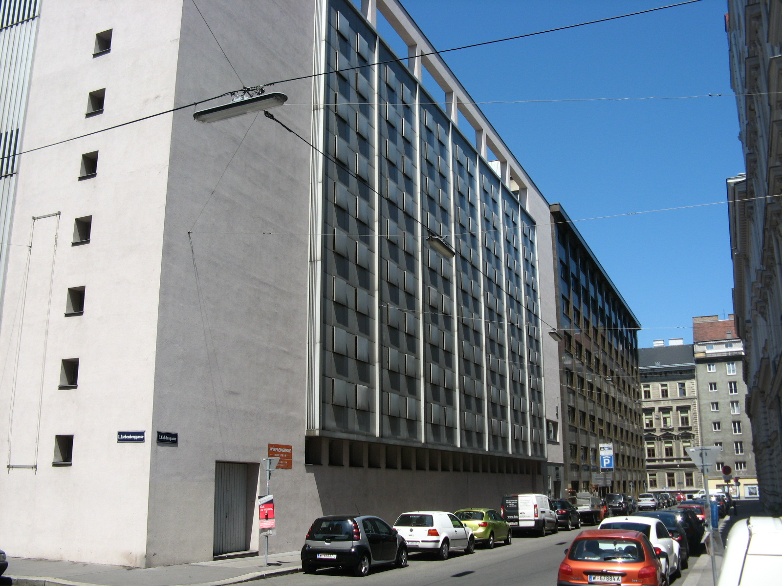 Umspannwerk Zedlitzhalle (1969/70) von Franz Zajicek, Cobdengasse 4, Wien-Innere Stadt